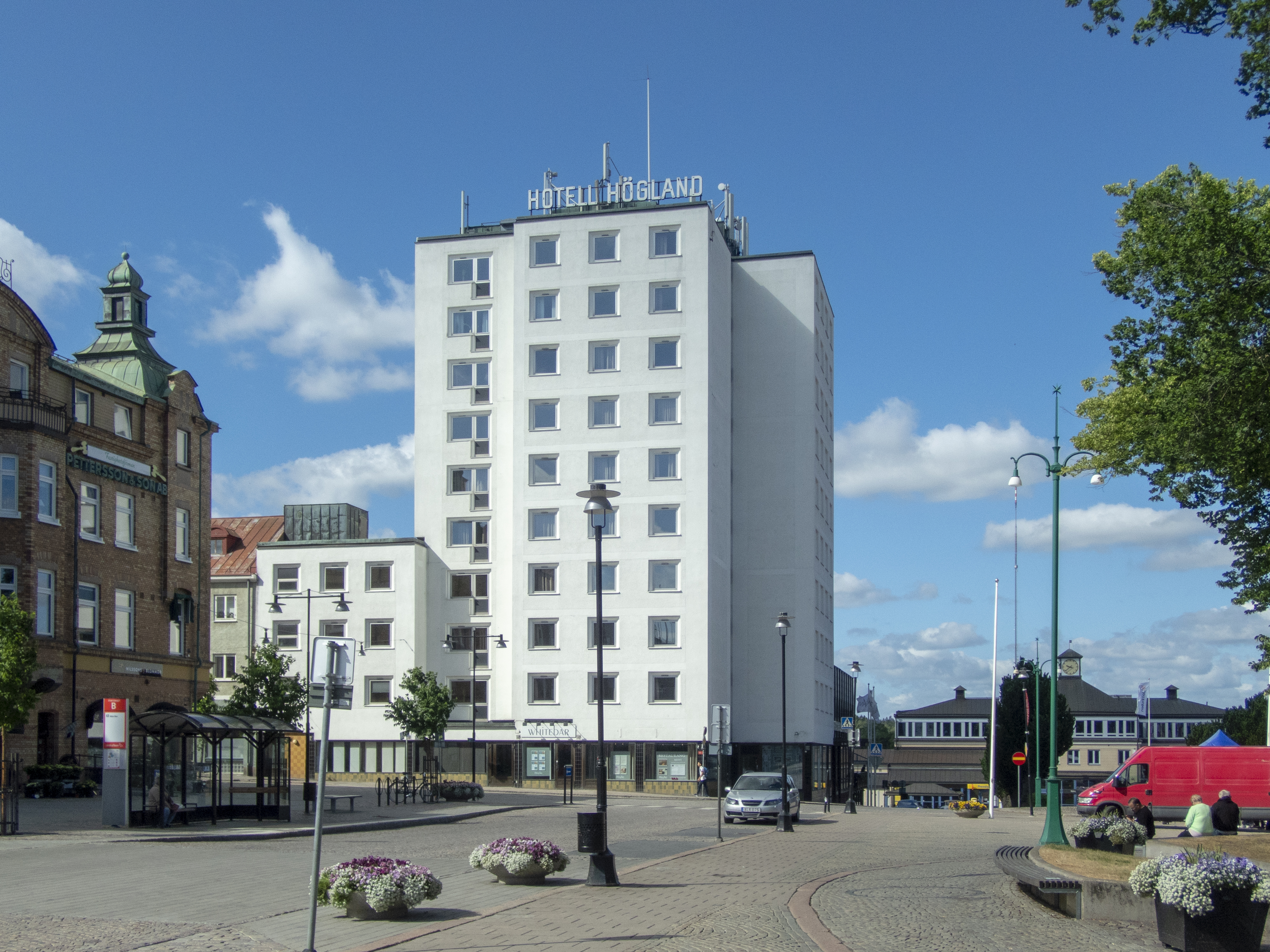 Hotell Högland, Nässjö. Invigt 1964. Arkitekter: Forssman & Snellman